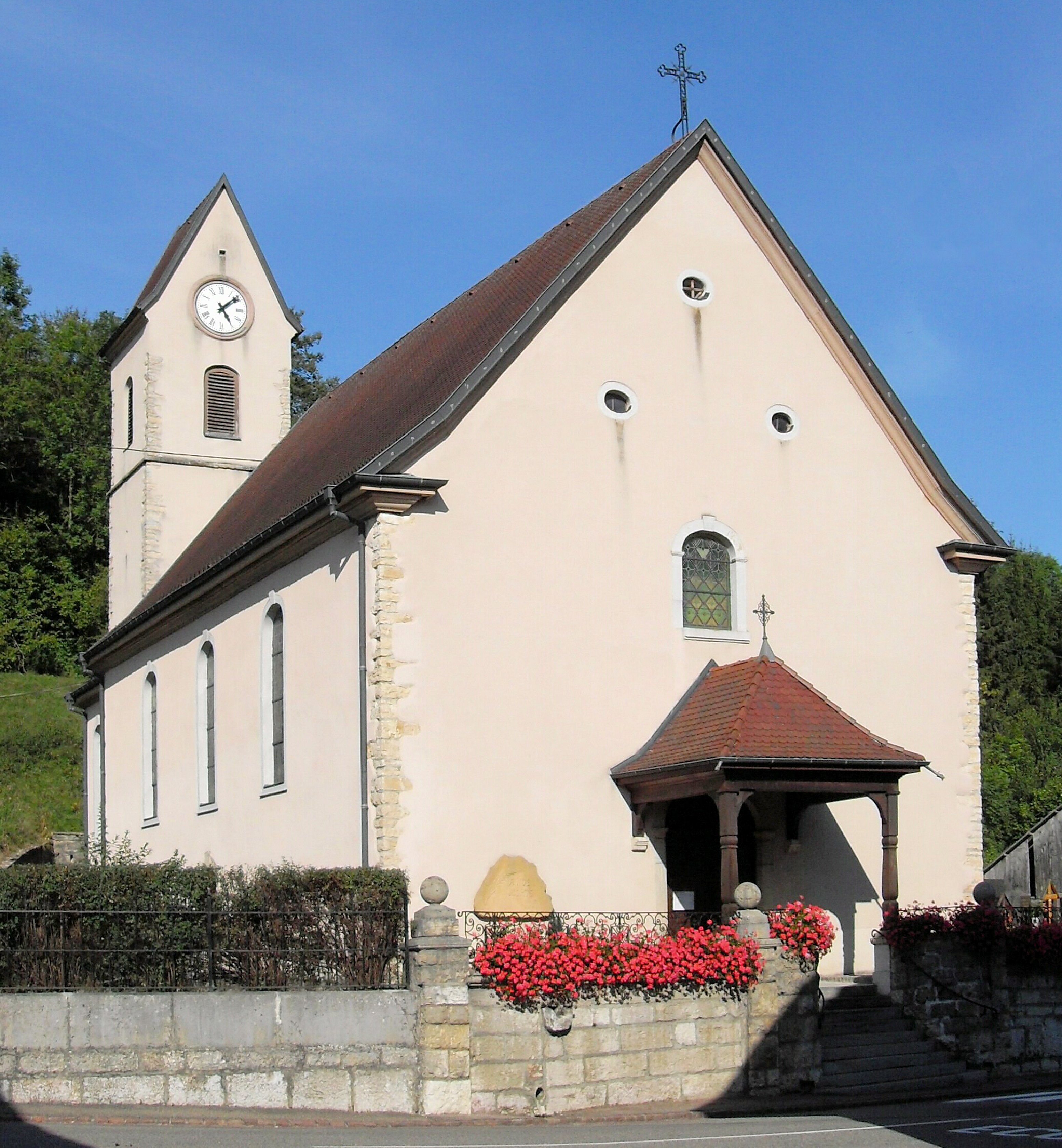 L'église Saint-Georges à Ligsdorf